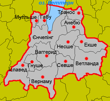 Карта адміністративного поділу лену Єнчепінг у Швеції. Карту створено на основі карти File:Jönköping County.png.